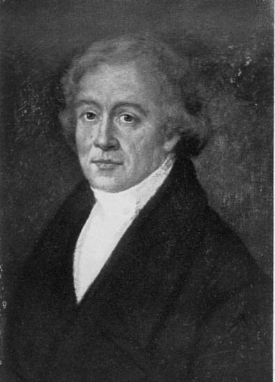 Christian August Volpius (1762-1827) Ölgemälde um 1800.